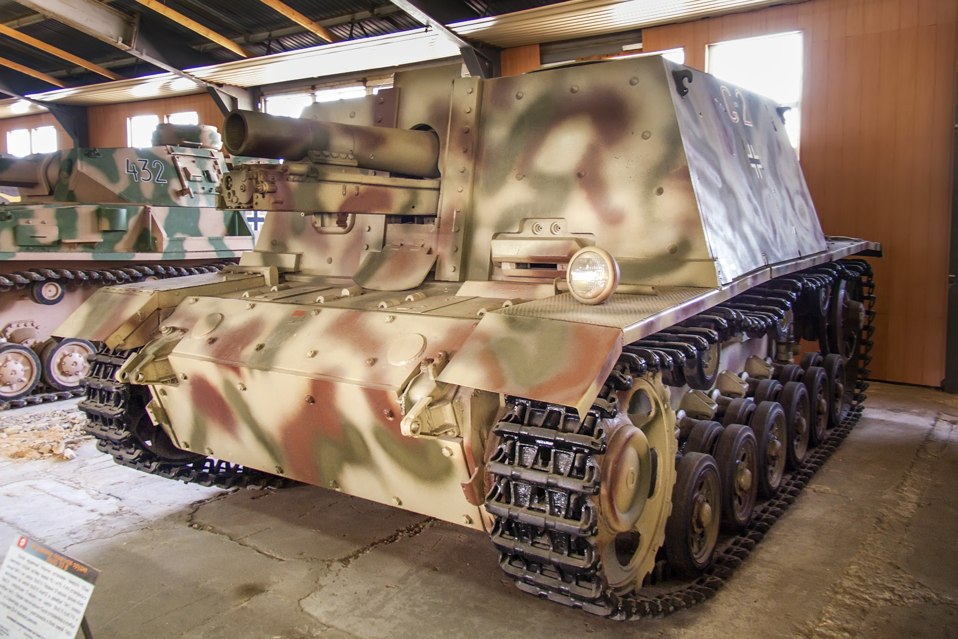 Самоходная установка StuIG 33B в Центральном музее бронетанкового вооружения и техники в Кубинке.